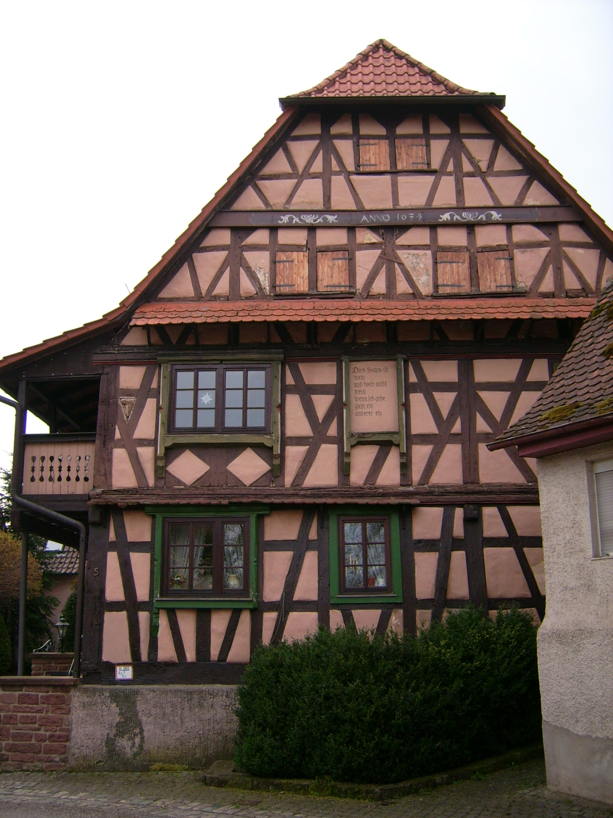 House in Diefenbach Germany